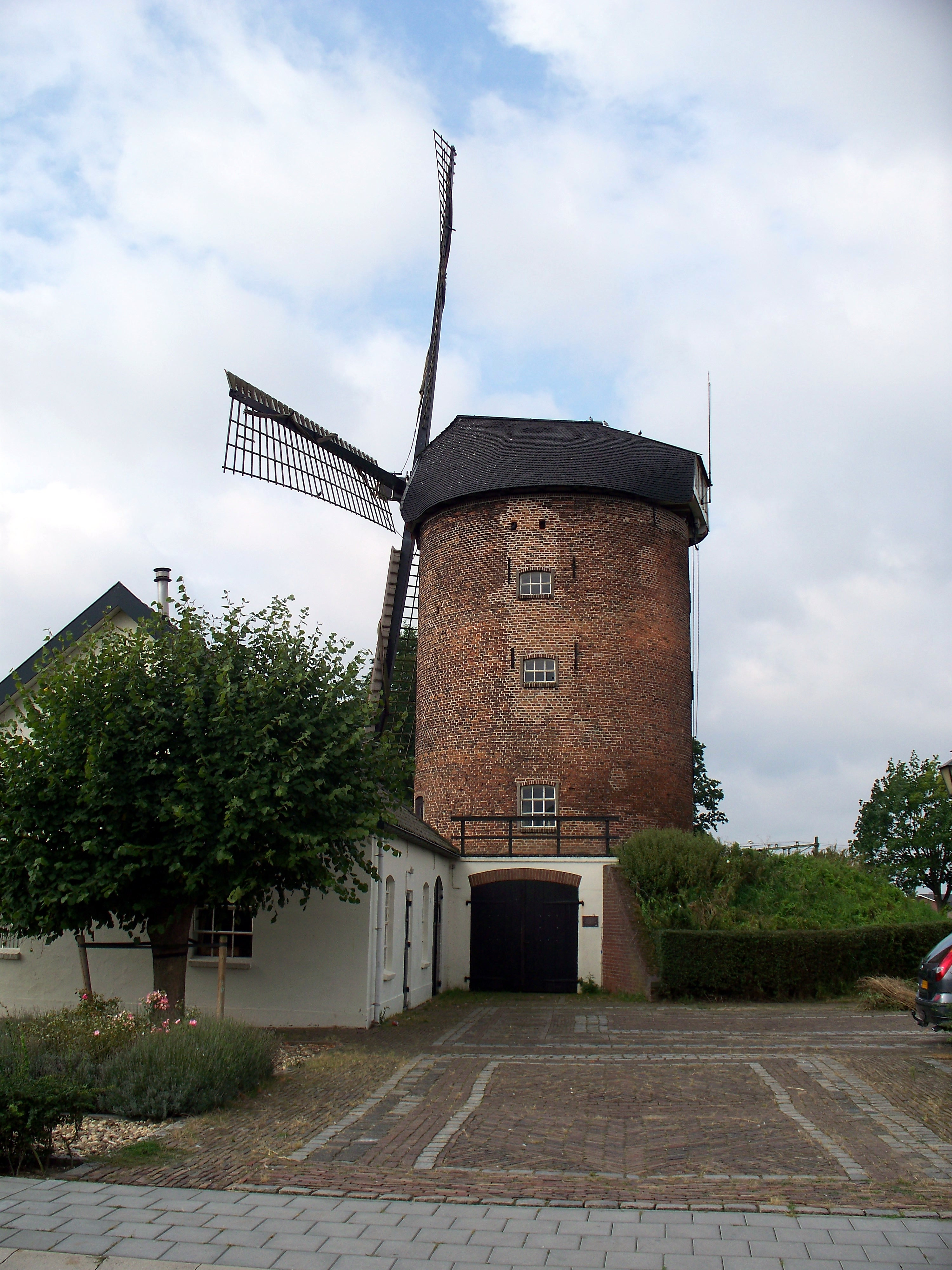 "De Buitenmolen" te Zevenaar, Molenstraat.